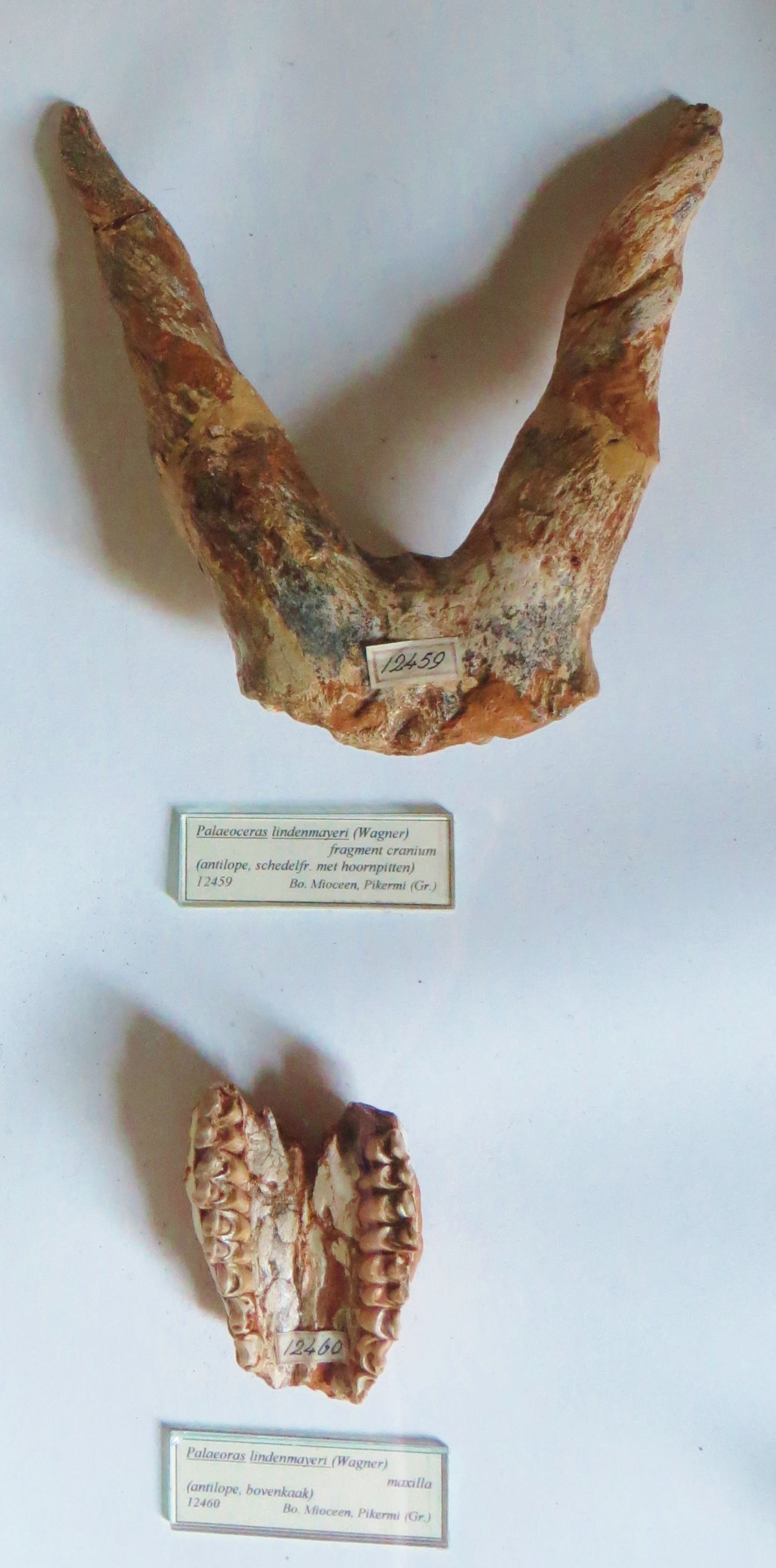 Fossil of Palaeoreas, an extinct mammal- Took the picture at Teylers Museum, Haarlem